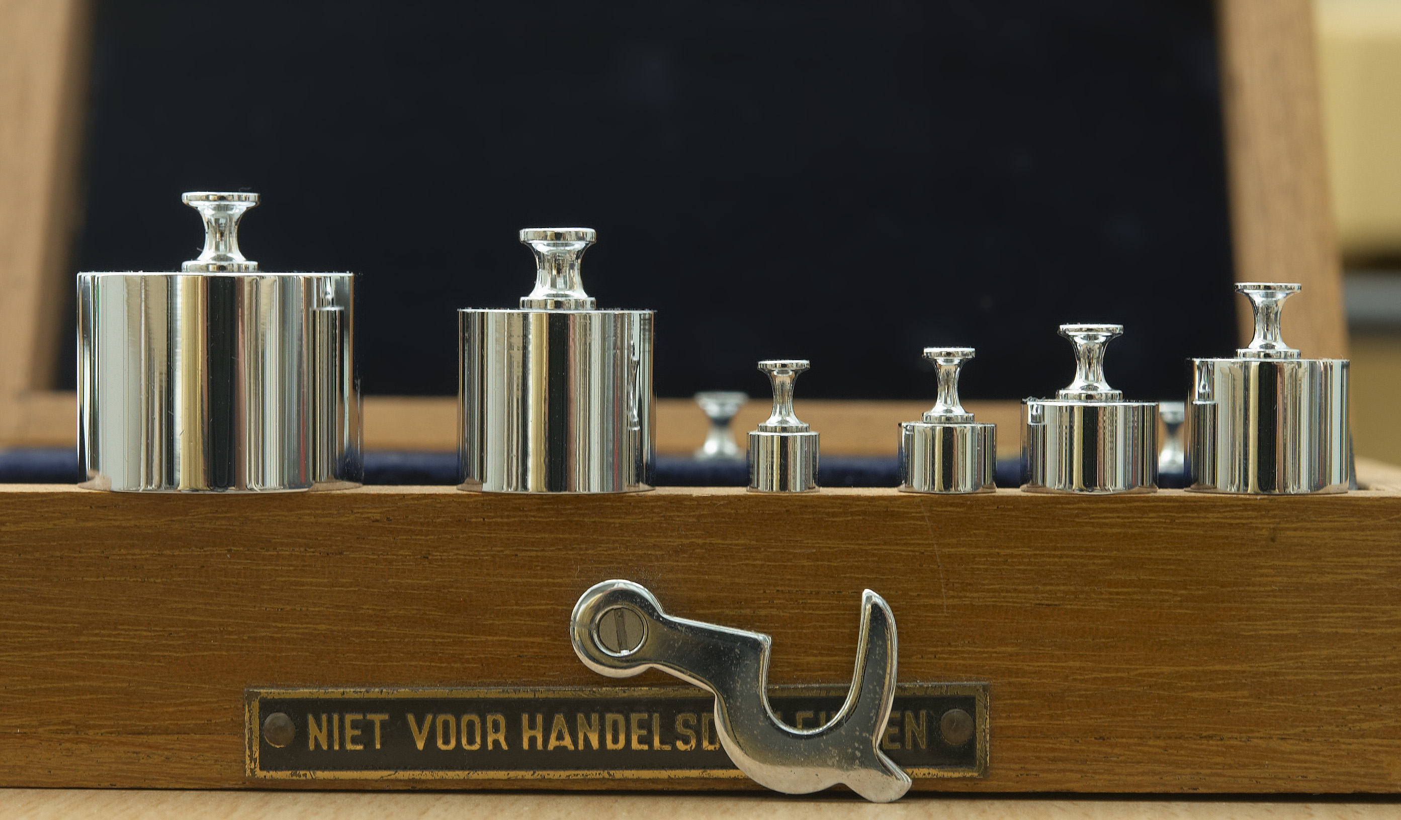 Gewichten van 50, 20, 1, 2, 5 en 10 gram uit een gewichtendoos